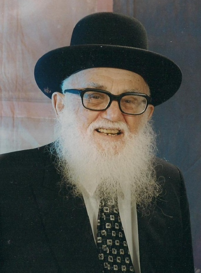 הרב ישעיהו גולדשמידט זצ"ל אב"ד תל אביב